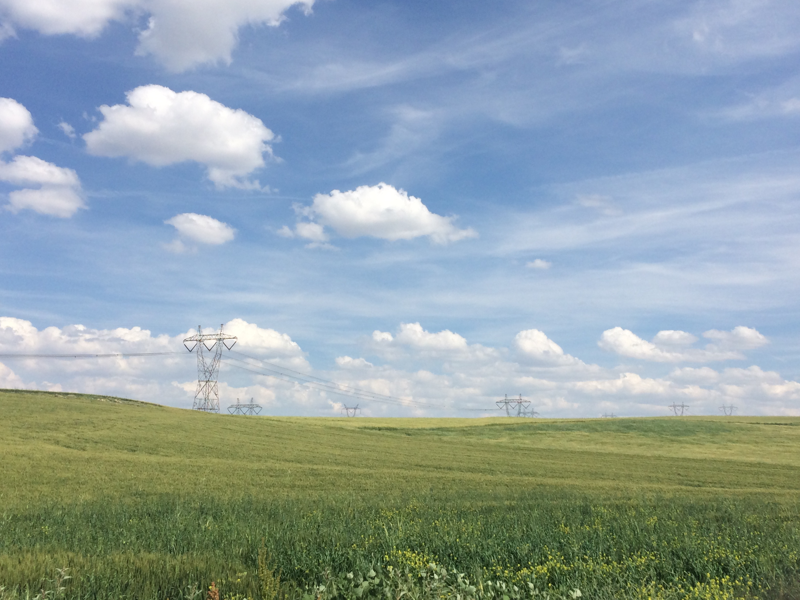 işte yemyeşil bir doğa, masmavi bir gökyüzü, bulutlar da eşlik ediyor. yüksek gerilim hattı manzaramıza ayrı bir tat katmış durumda. bu görüntüyü 2018 Eylül zamanlarında çimşit mezarlığı etrafında bulunan yollardan geçerken elde ettim.